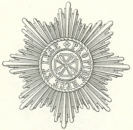 Tekening van ster van de Orde van de Witte Adelaar.